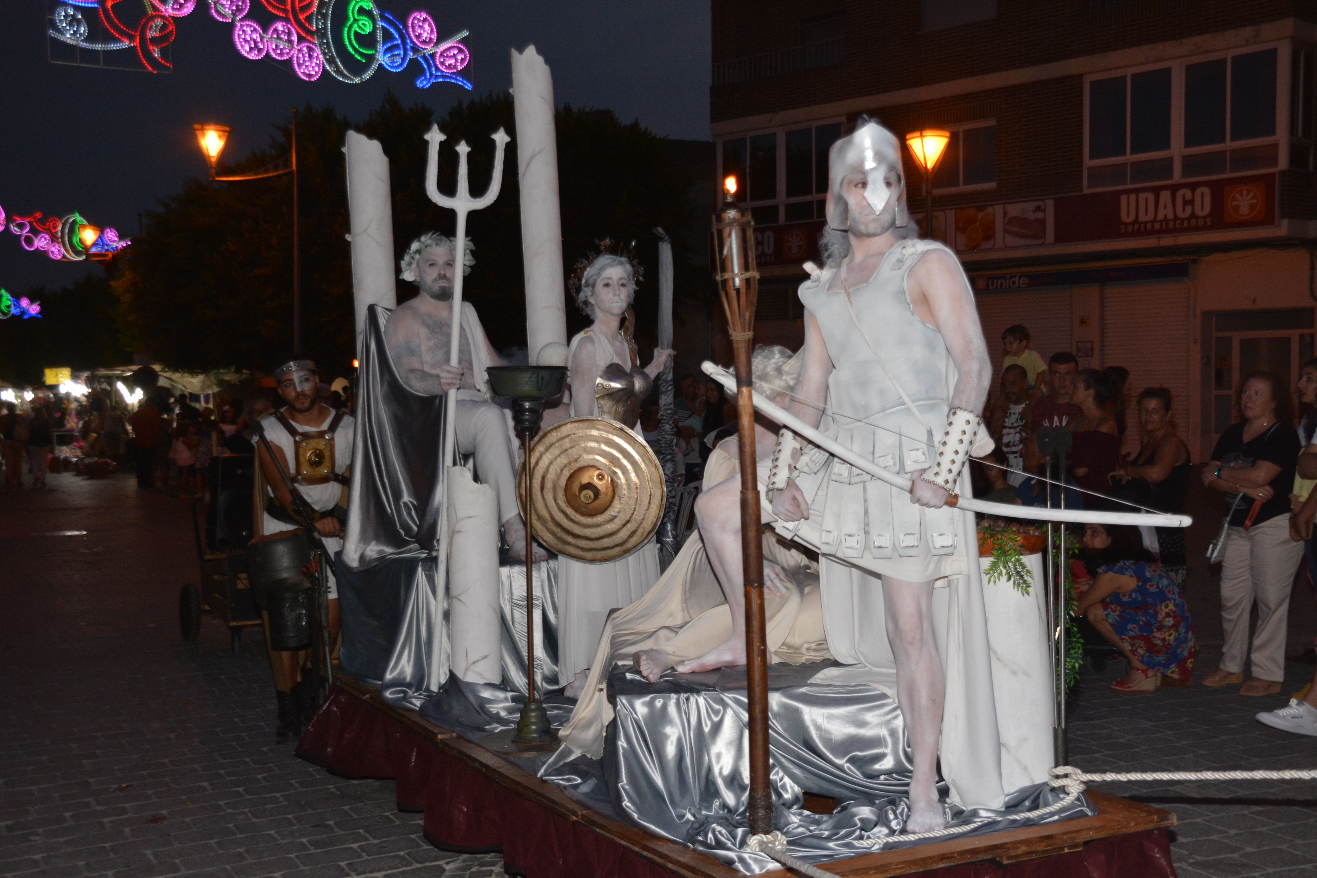 Fiestas de Sodales Ibero-Romanos This is a photography of a Folklore festival in Spain (Wikidata id Q23660934).